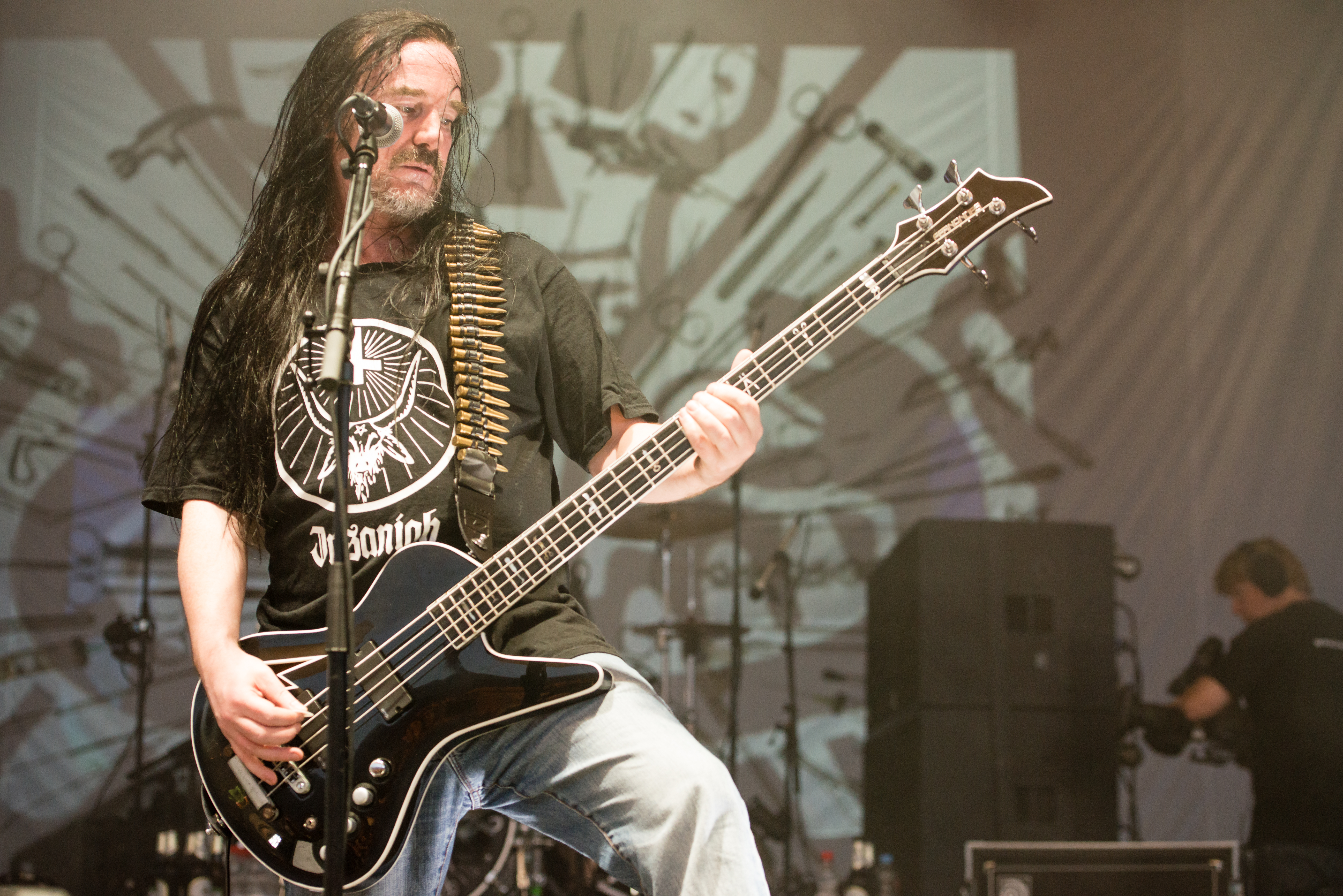 'Rock Hard Festival 2014 - Gelsenkirchen': 'Carcass'